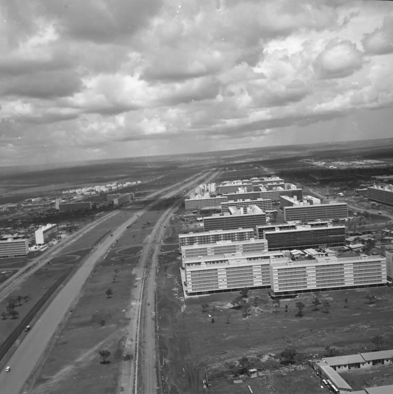 Imagem do Fundo Agência Nacional, do Arquivo Nacional